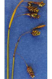 Carex paupercula, syn: Carex magellanica subsp. irrigua